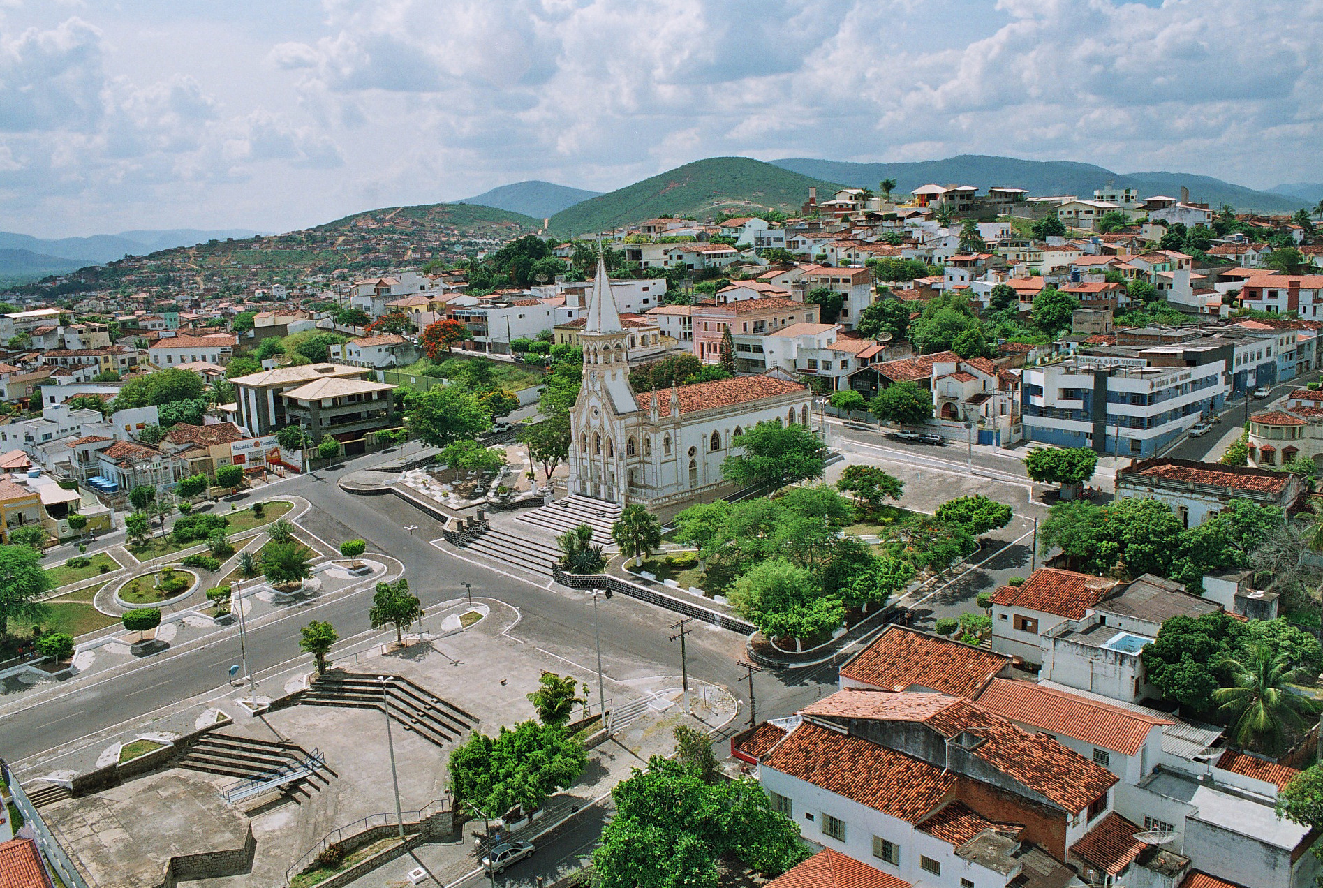 Vista da Igreja Matriz em Jequié.